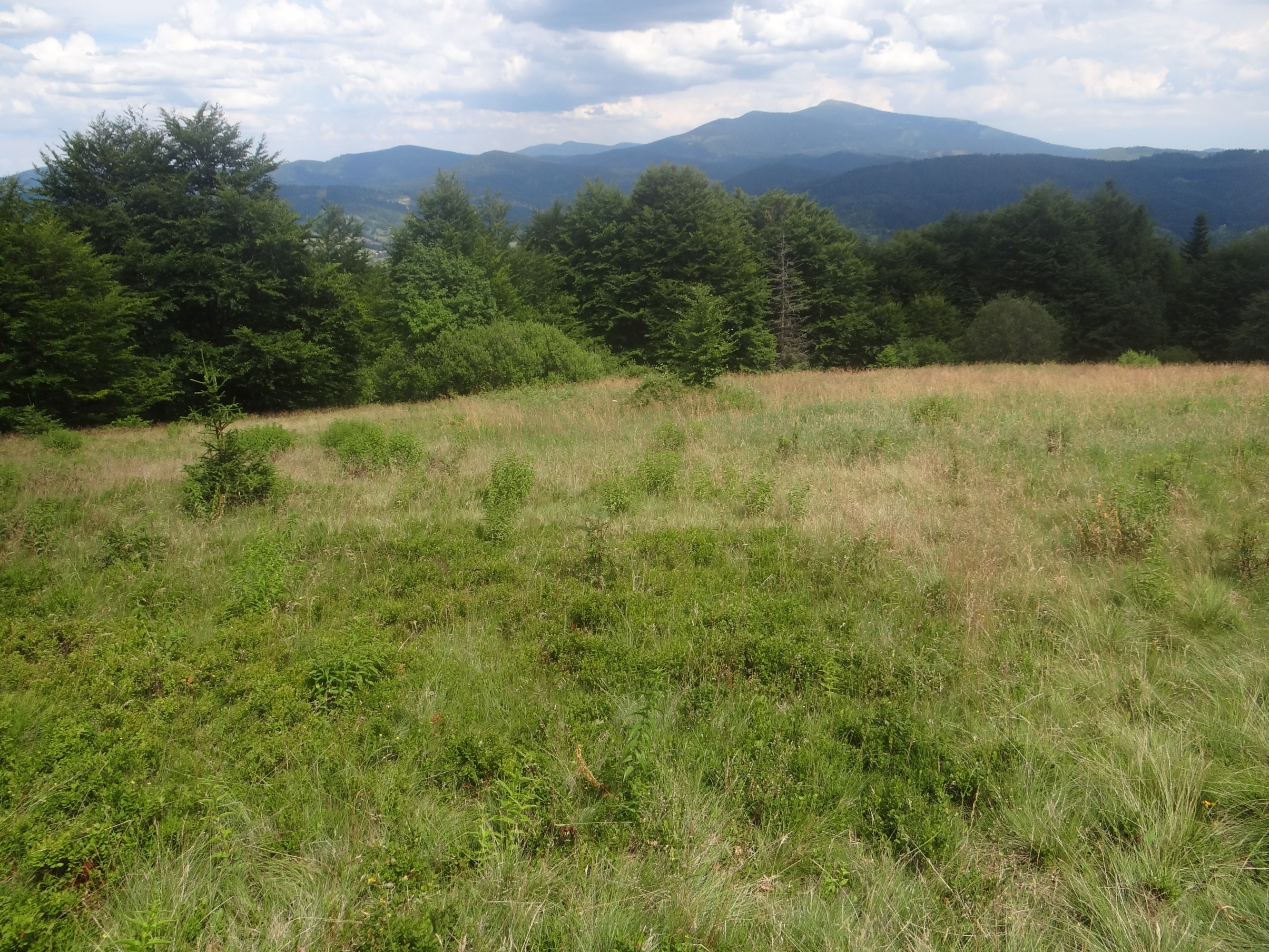 Hala Uszczawne w Beskidzie Żywieckim